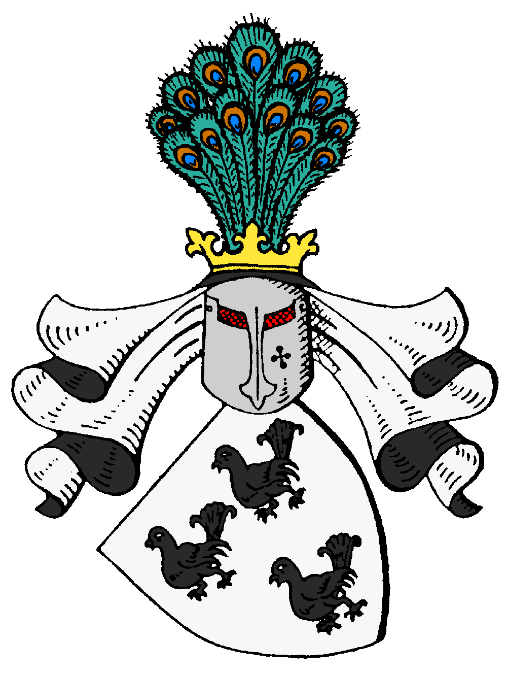 Wappen derer von Berkhahn